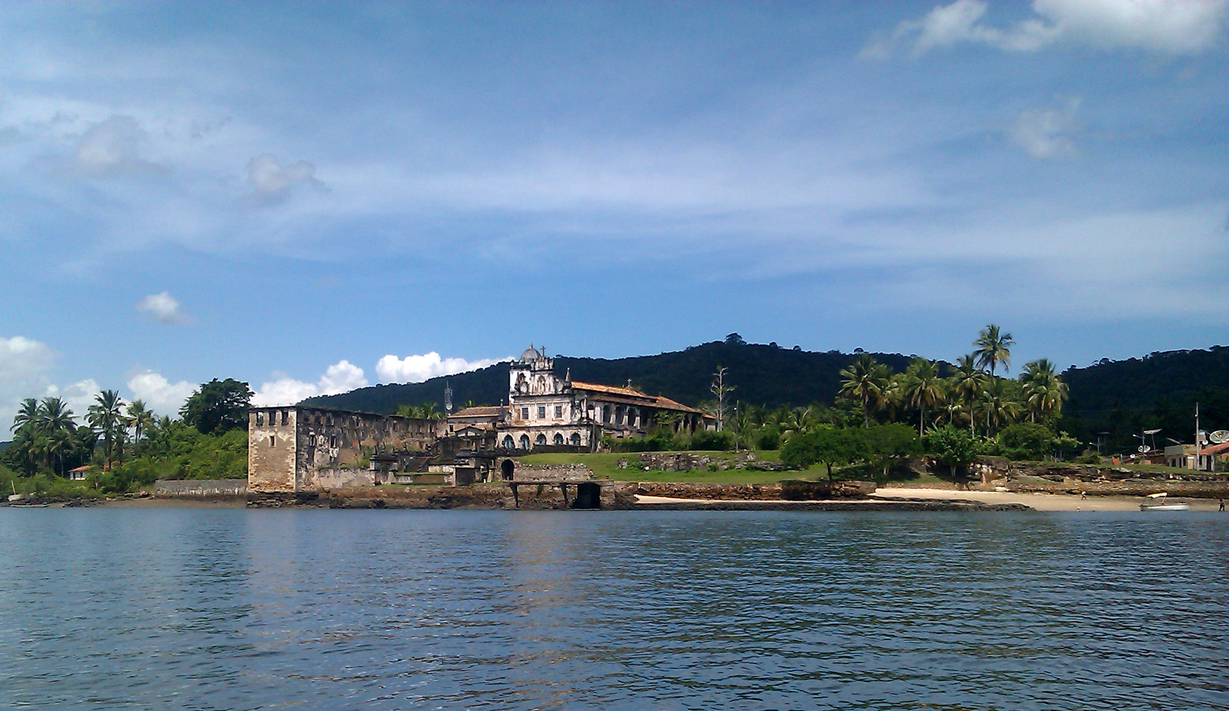 Convento de Santo Antônio do Paraguaçu, localizado no povoado de São Francisco do Paraguaçu